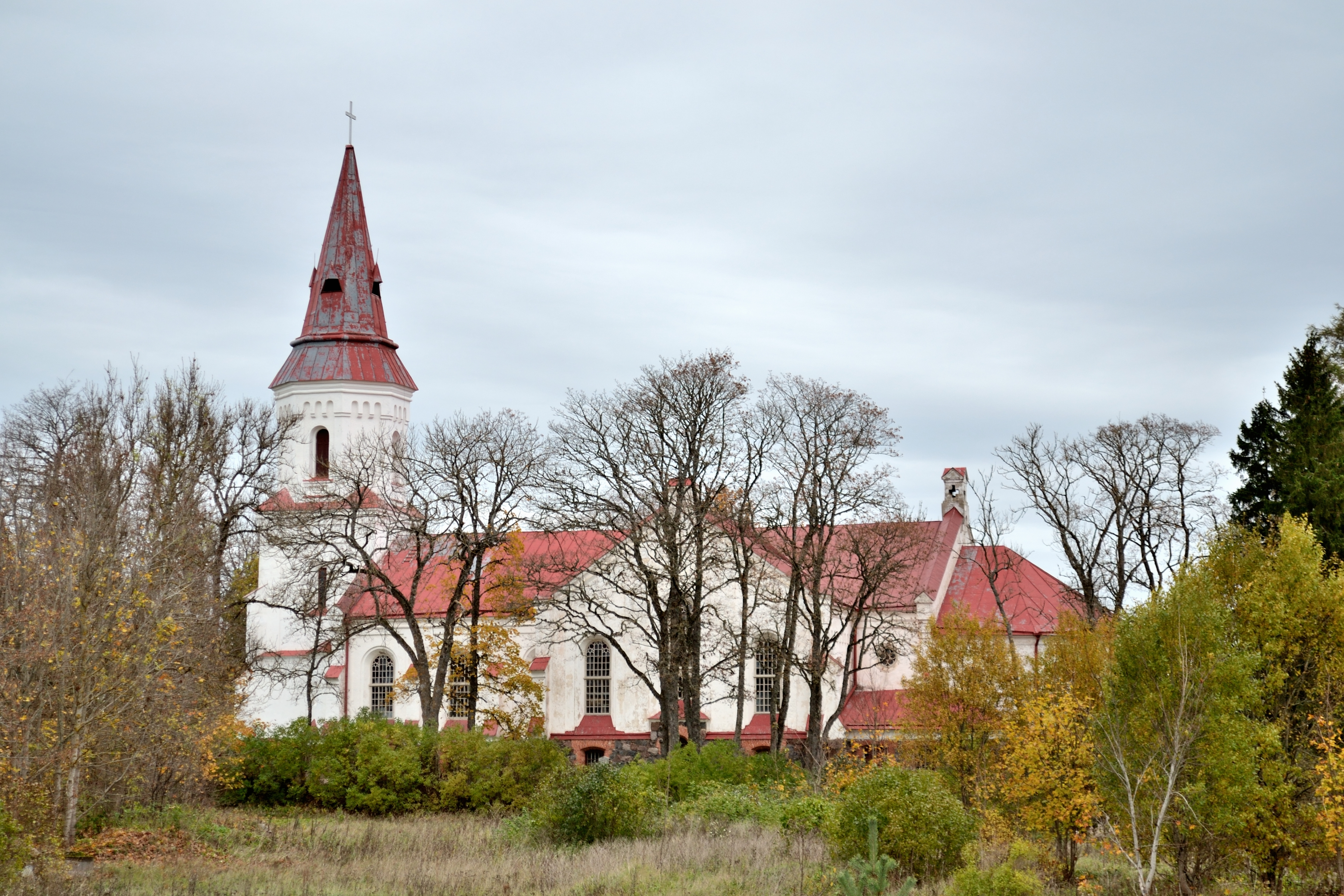 Hageri kirik